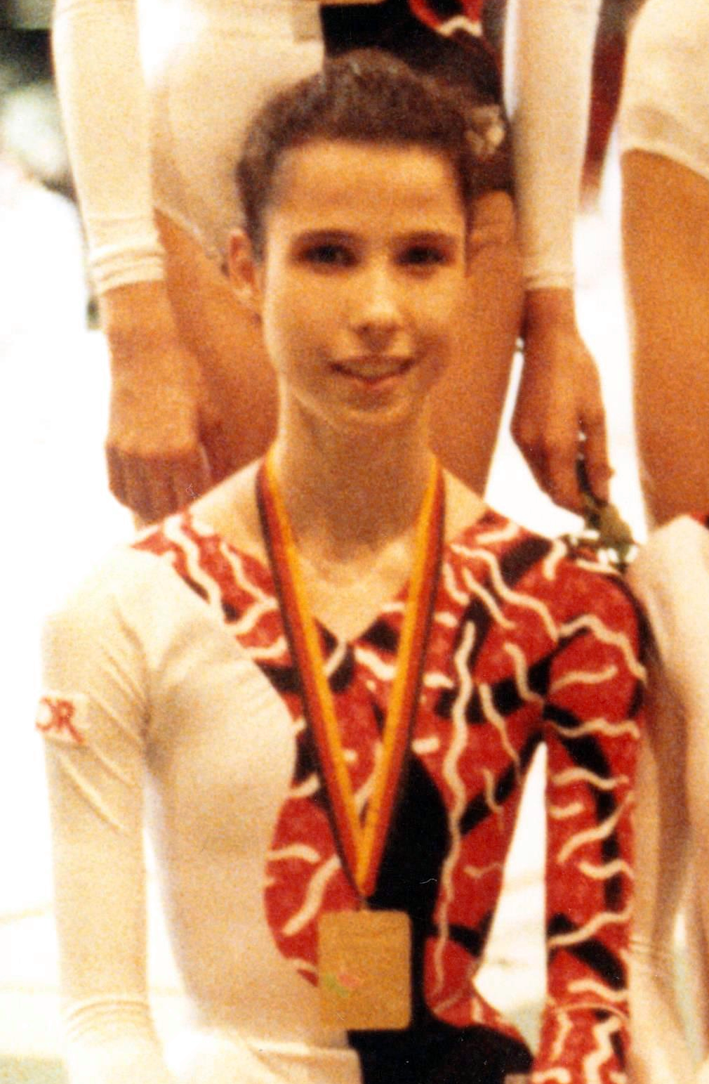 Alicia Martín en el Campeonato Europeo de Stuttgart en 1992.